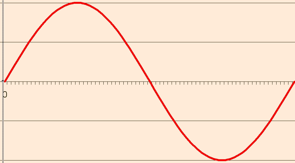 Door de auteur zelf vervaardigde afbeelding.